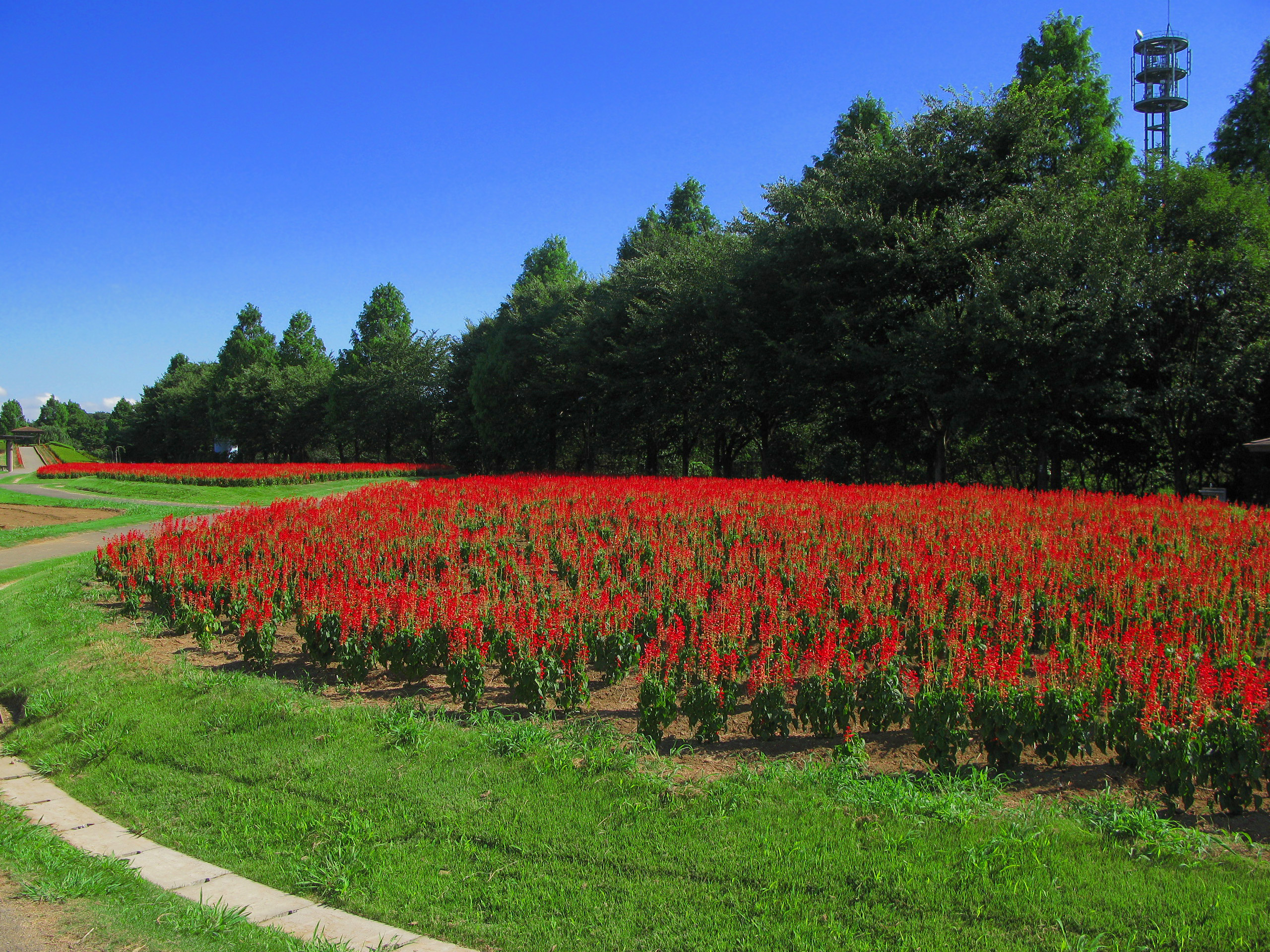 大宮花の丘農林公苑のサルビア畑（埼玉県さいたま市西区）